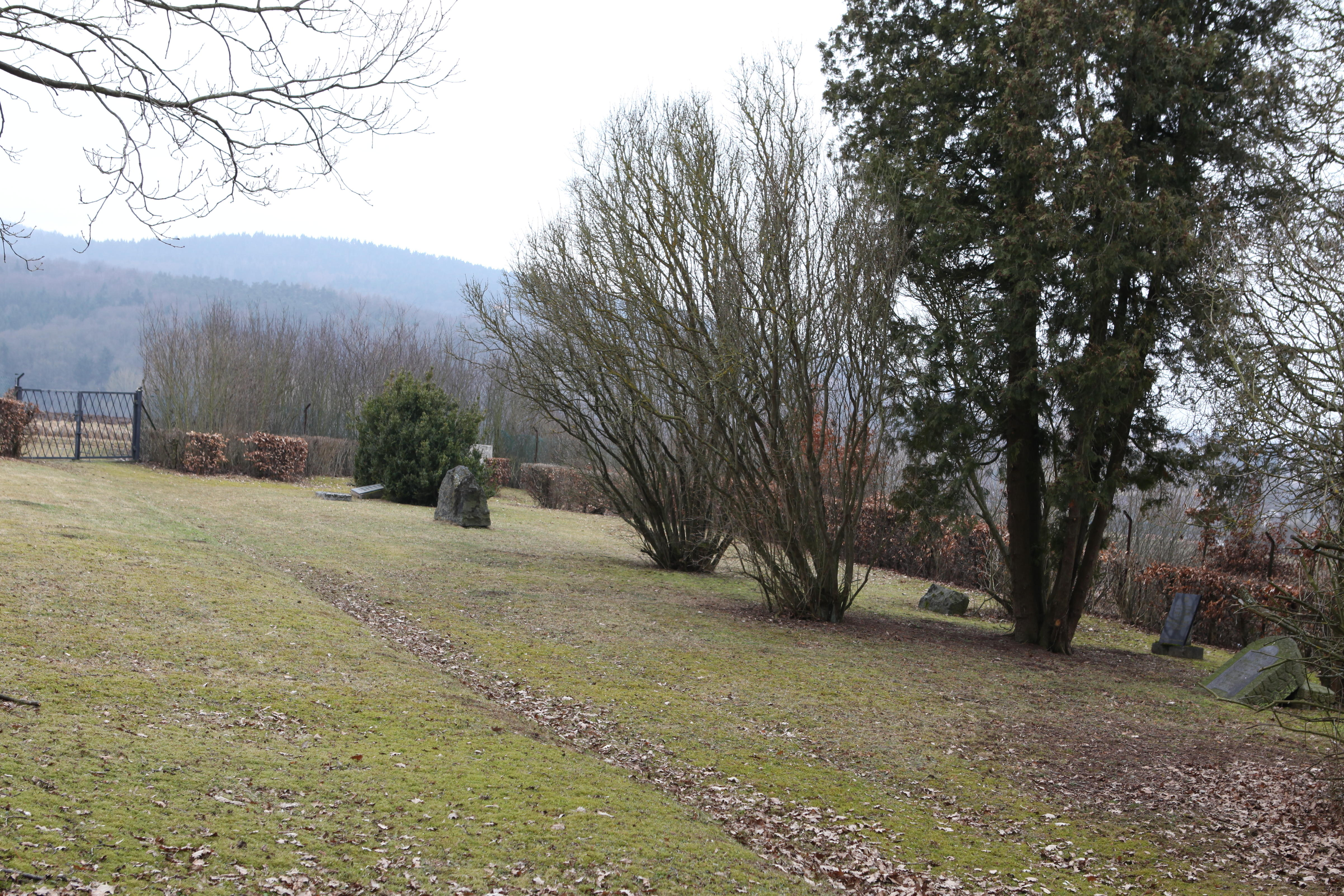 Lichtenfels, Landkreis Lichtenfels, Jüdischer Friedhof